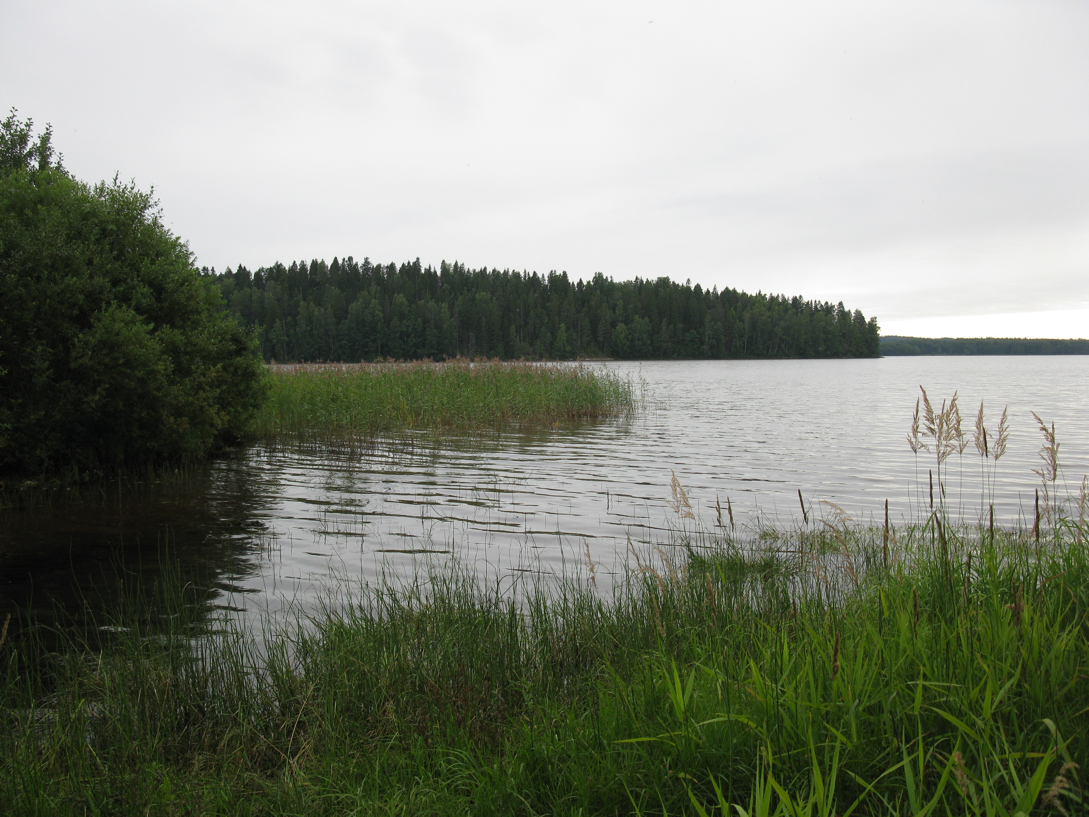 Holman saari Painiojärvessä Somerniemellä Somerolla nähtynä Vesanojan suulta